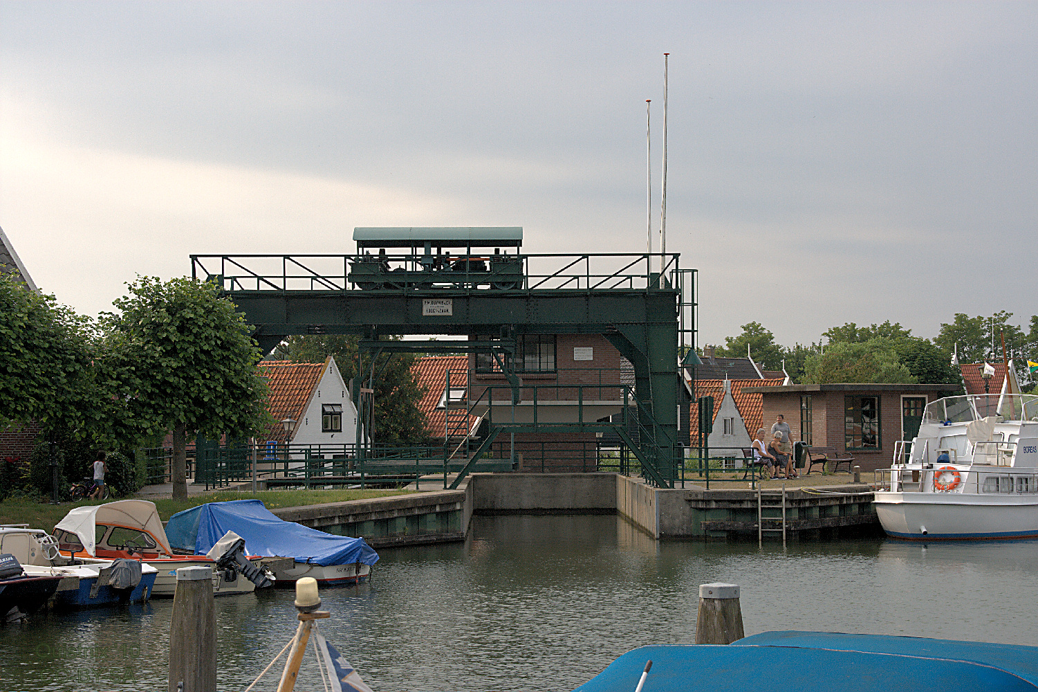 Overhaal of scheepslift bij Broekerhaven. Bouwjaar 1923-24. Rijksmonument nummer 46919